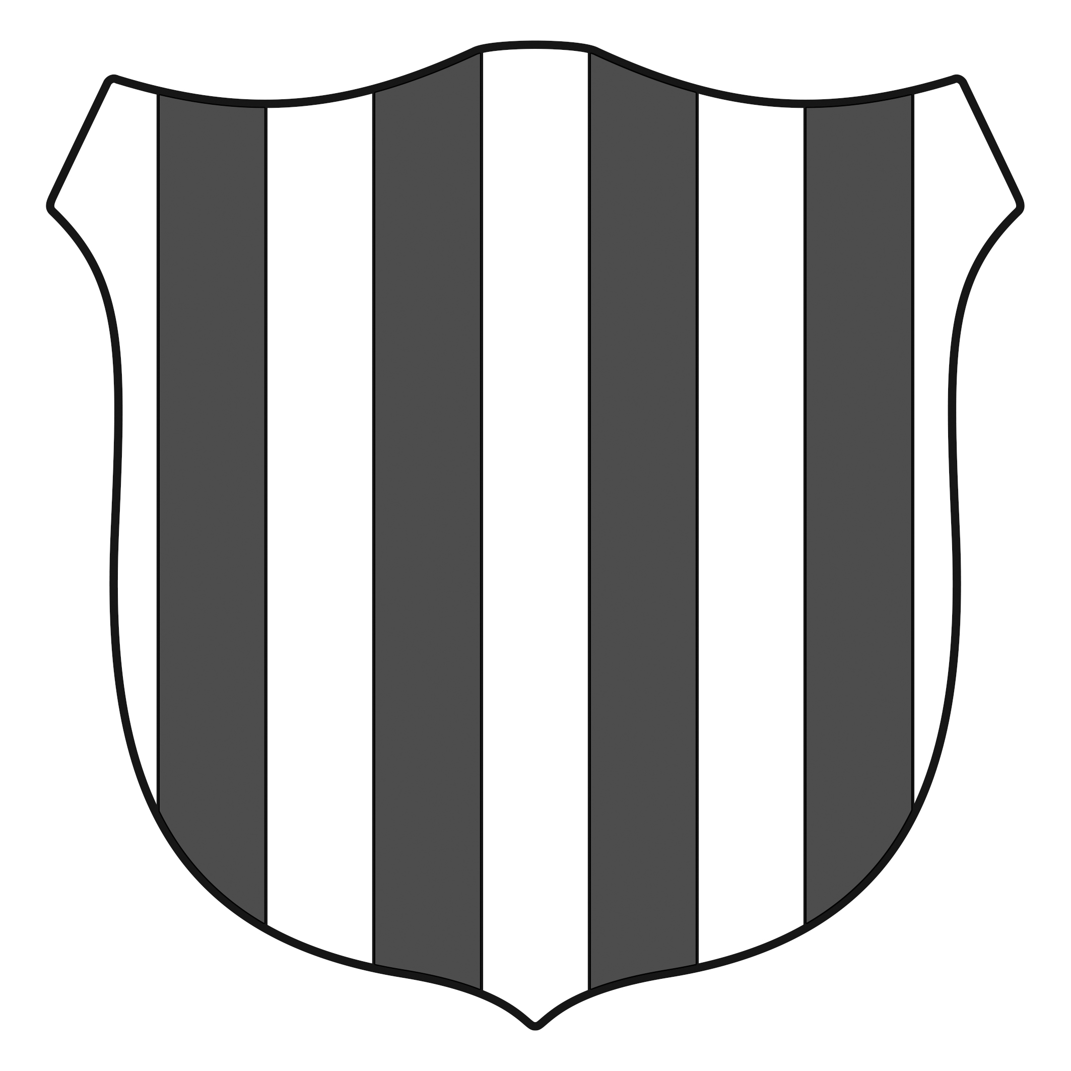 Stammwappen des Hauses Bell